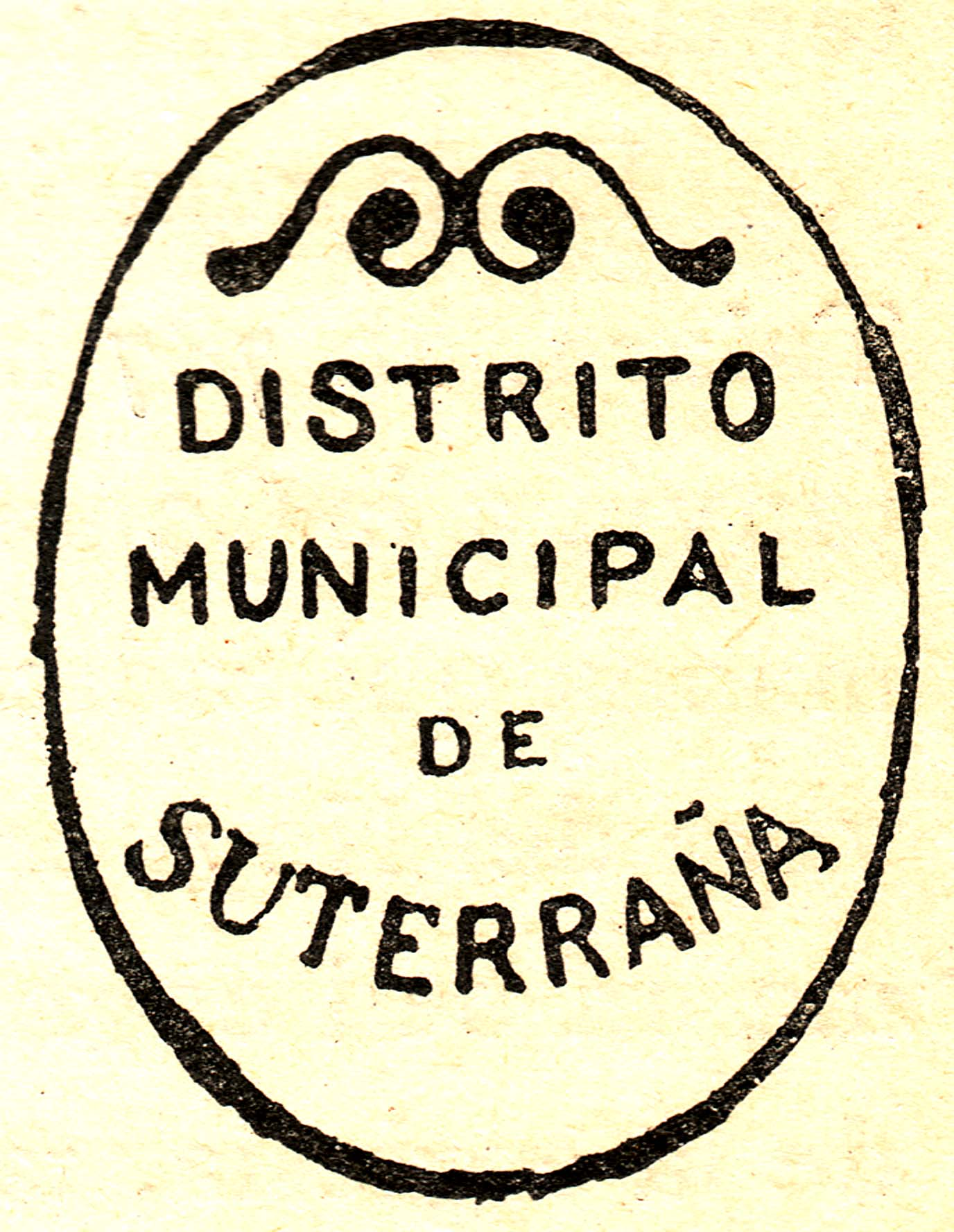 Segell municipal de Suterranya de vers el 1900 (Tremp, Pallars Jussà)